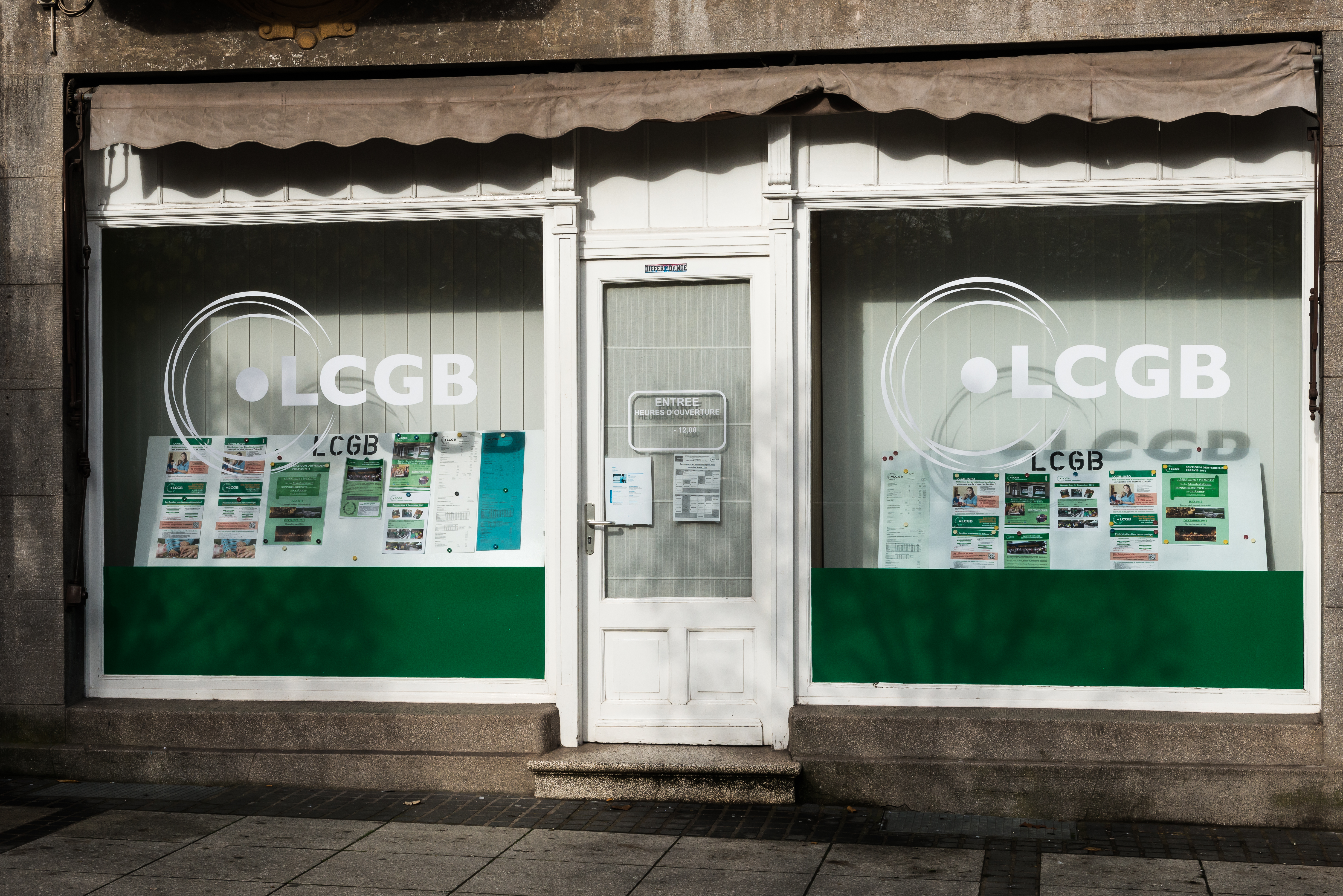 De Büro vum LCGB, rue Adolphe-Krieps zu Déifferdeng.